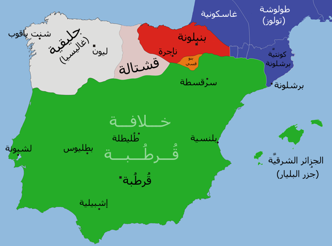 خارطة تُظهر الأندلس والممالك المسيحيَّة المُجاورة.